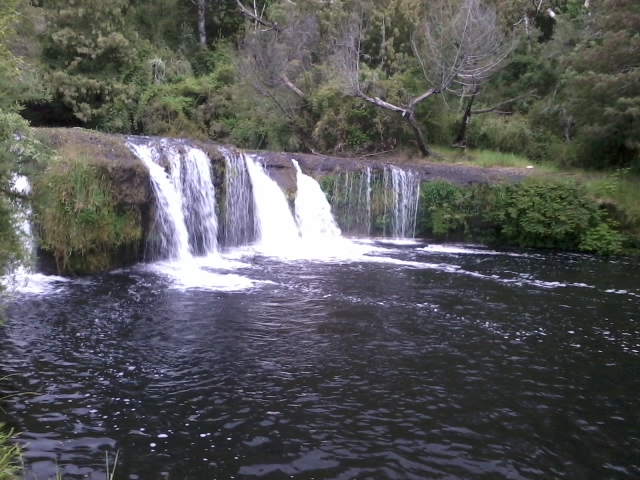 Rio Dumo. mas conocido como "Salto Dumo" balneario natural de la localidad de Pailahueque lugar turístico para los lugareños del sector y turistas que todos los veranos lo visitan por la hermosura del paisaje y las cataratas que lo hacen único en la zona.